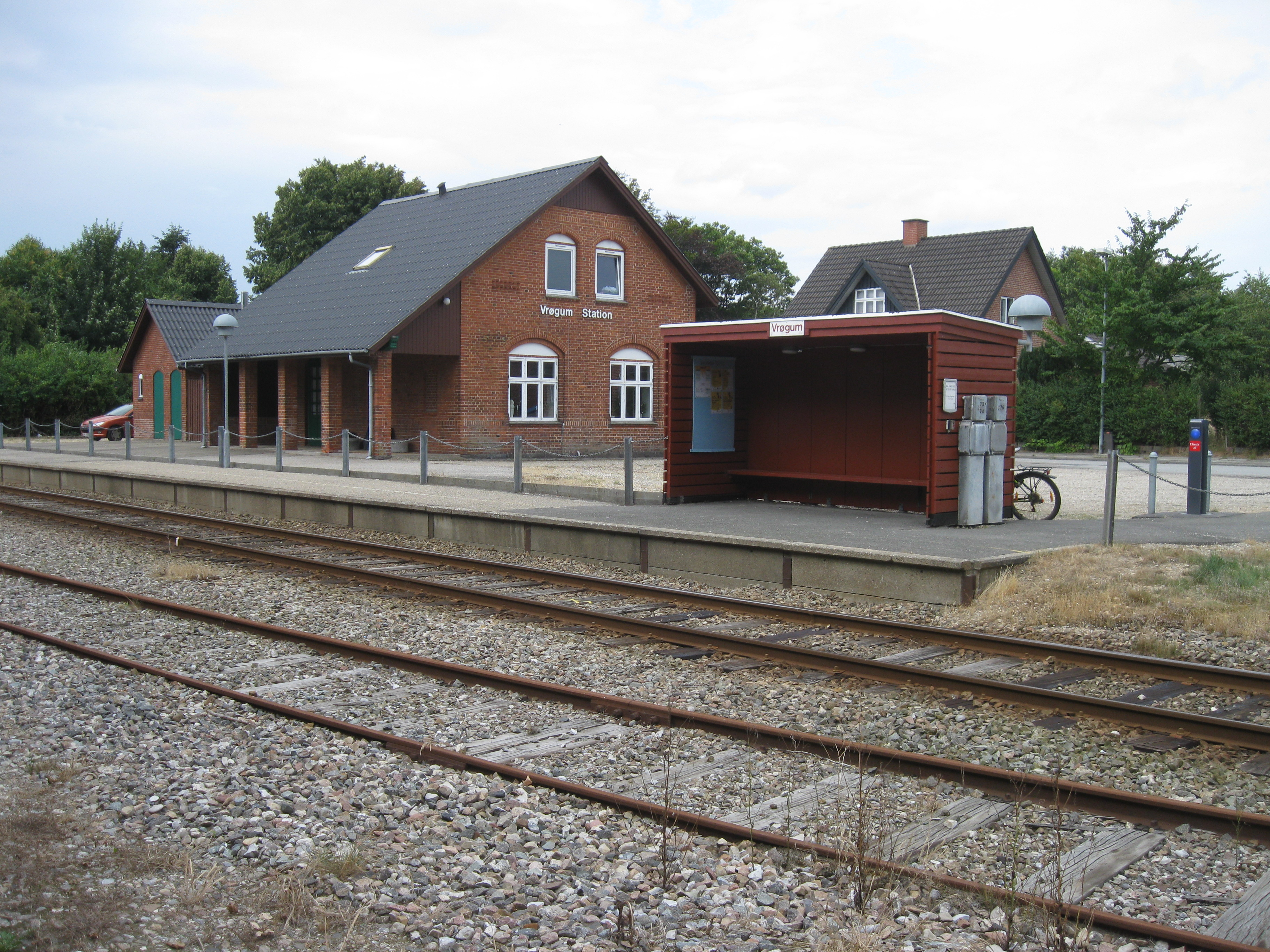 Vrøgum station